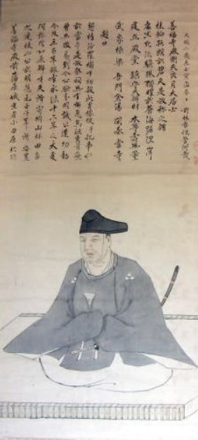 北条綱重(氏信)の肖像。